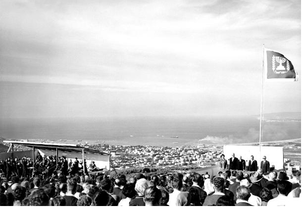 טקס אבן הפינה של אוניברסיטת חיפה, 21.10.1965 מתוך: הארכיון ע"ש אבא חושי